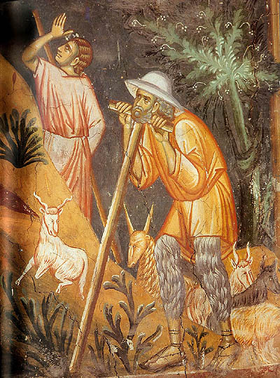 Srpskohrvatski / српскохрватски: Crkva sv. Dimitrija, Rođenje Hristovo detalj,1346.